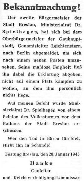 Bekanntmachung der Erschießung des stellvertretenden Bürgermeisters von Breslau